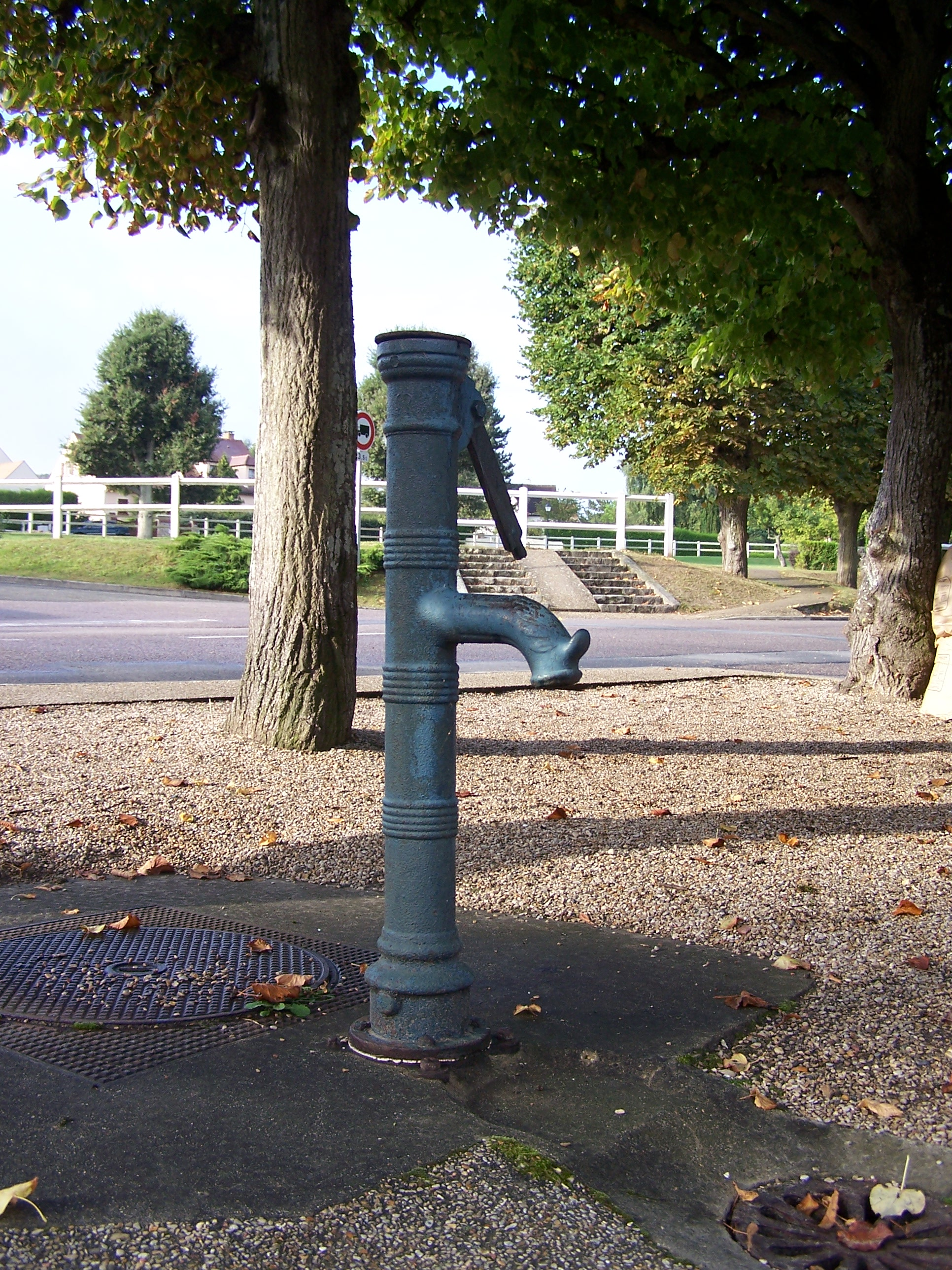 Pompe à eau ancienne de Millemont (Yvelines, France)